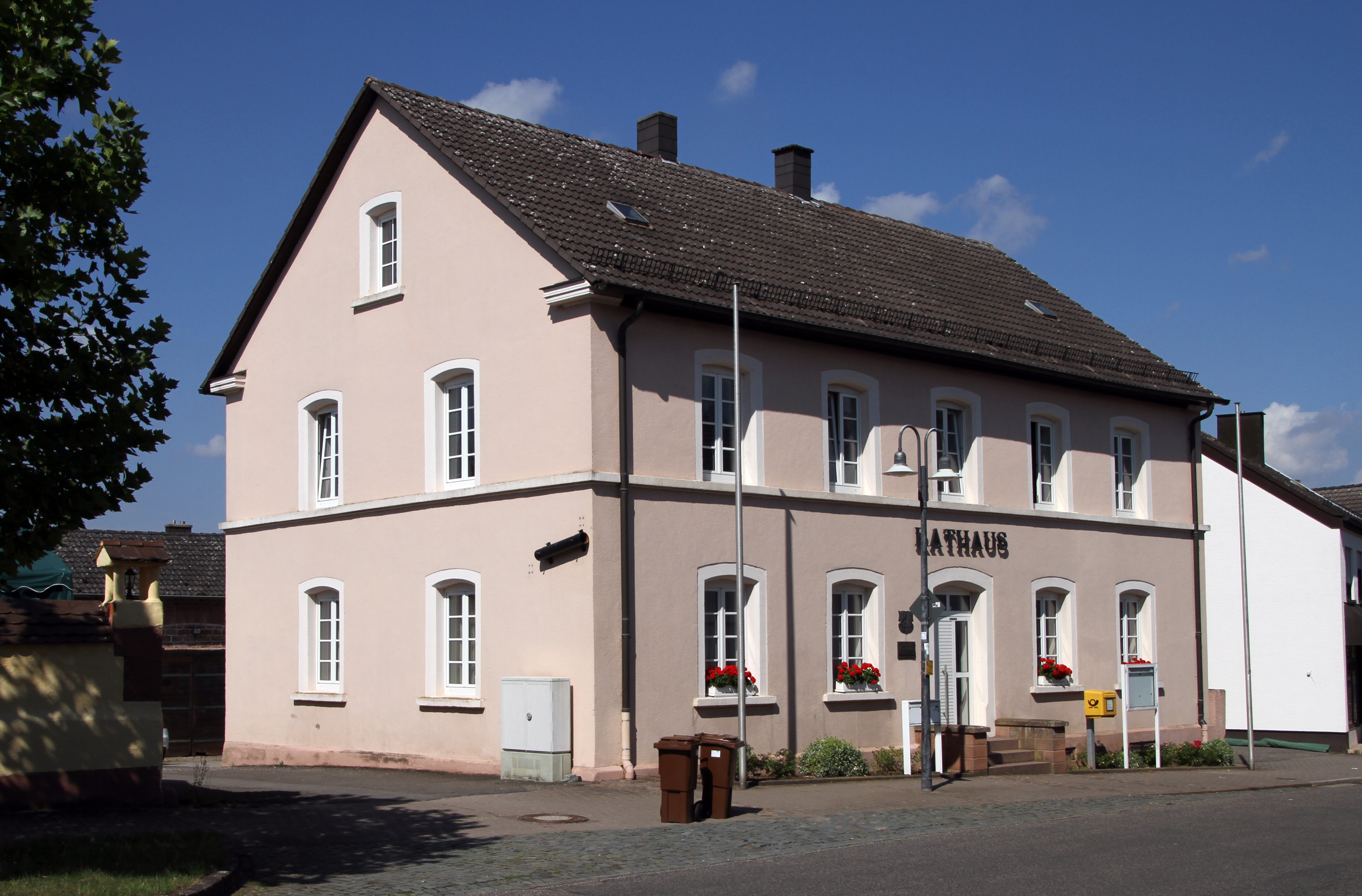 Clausen, Rathaus.